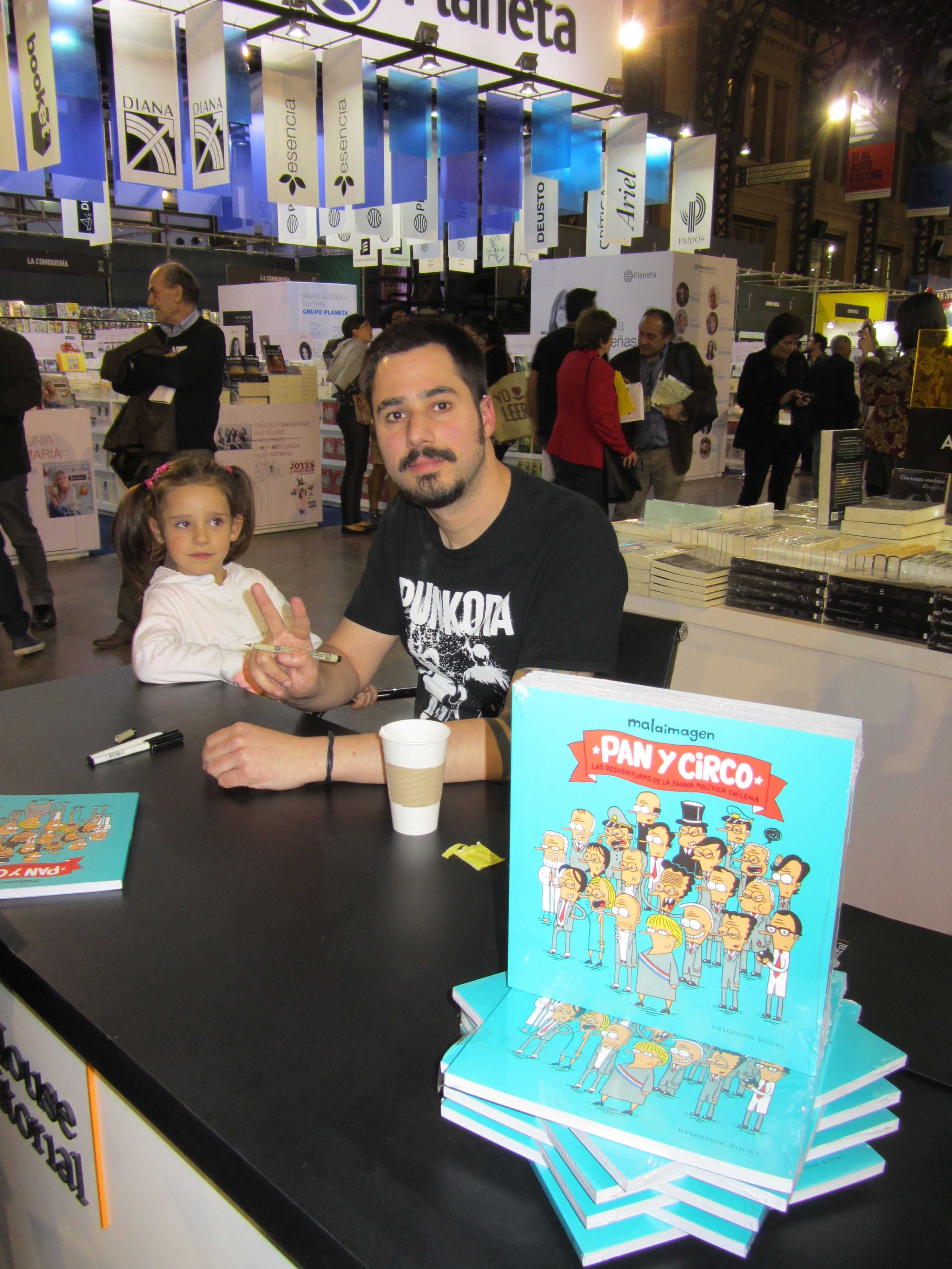 El dibujante chileno Malaimagen (Guillermo Galindo) en el stand de Penguin Random House durante una sesión de firma de libros en la Feria Internacional del Libro de Santiago 2015